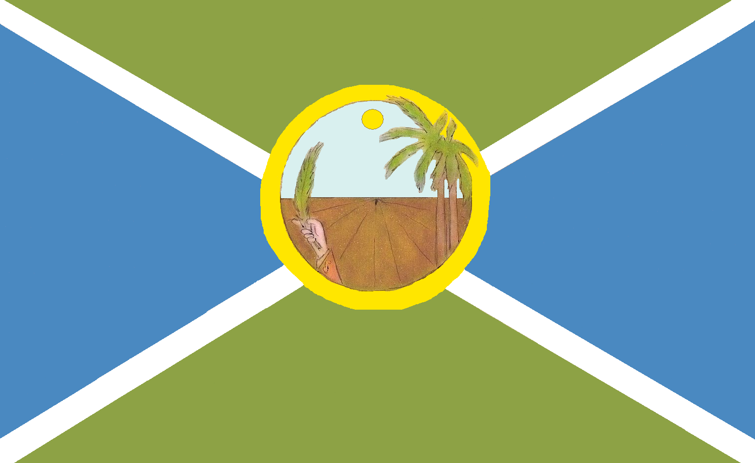 Bandera del municipio Chaguaramas, estado Guárico, Venezuela